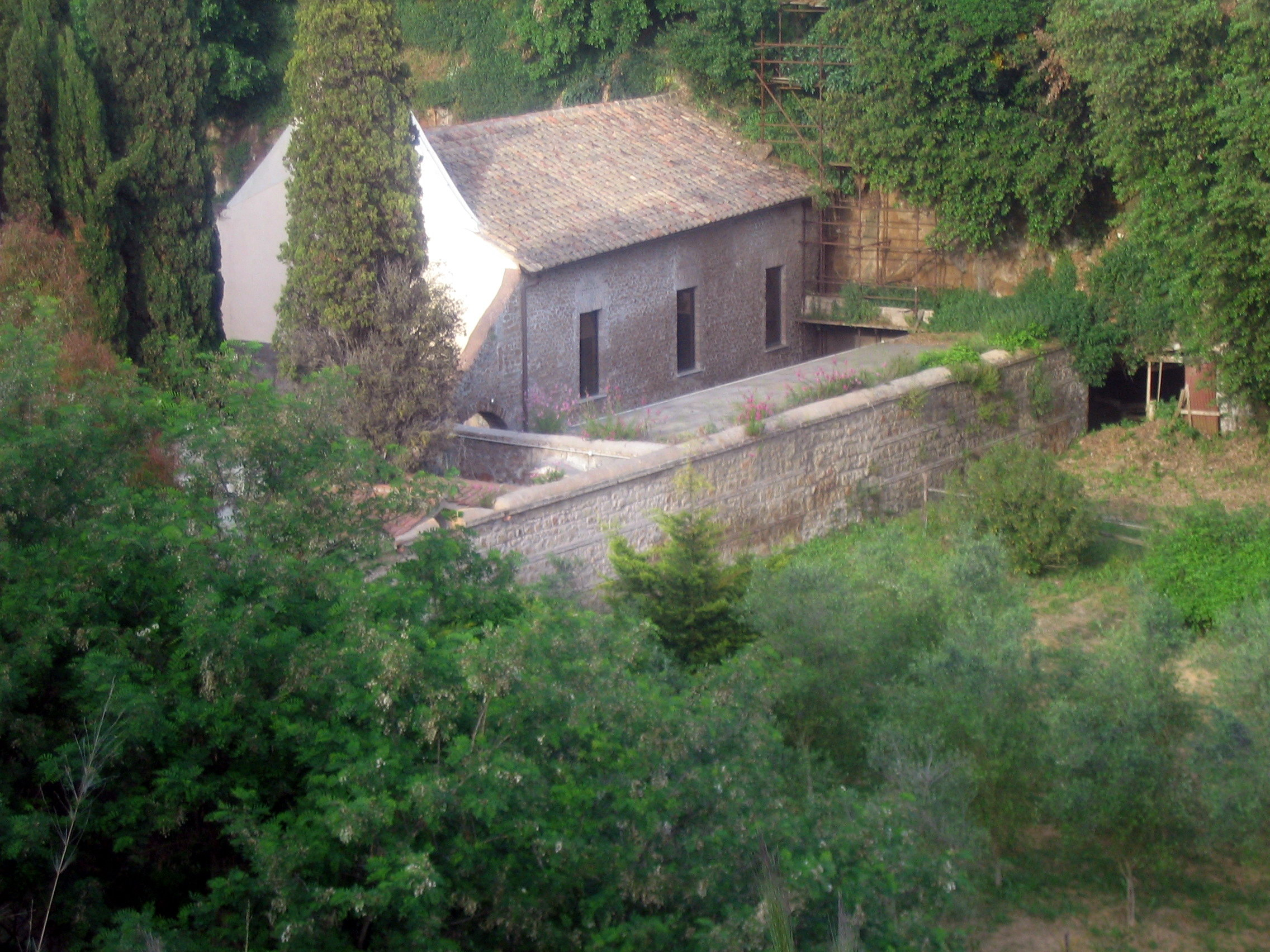 La chiesa di Santa Marina ad Ardea (prov. di Roma), Lazio.